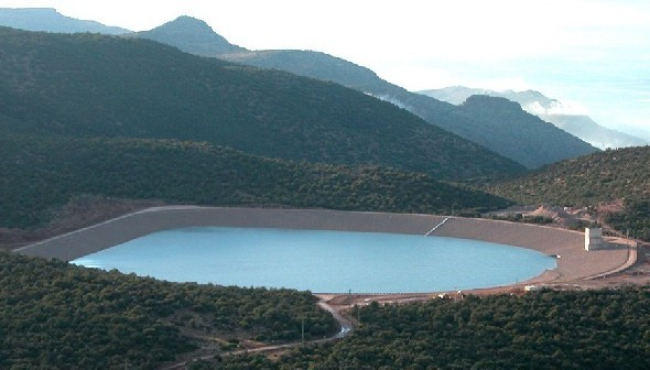 Le bassin supéreieur de la STEP Afourer